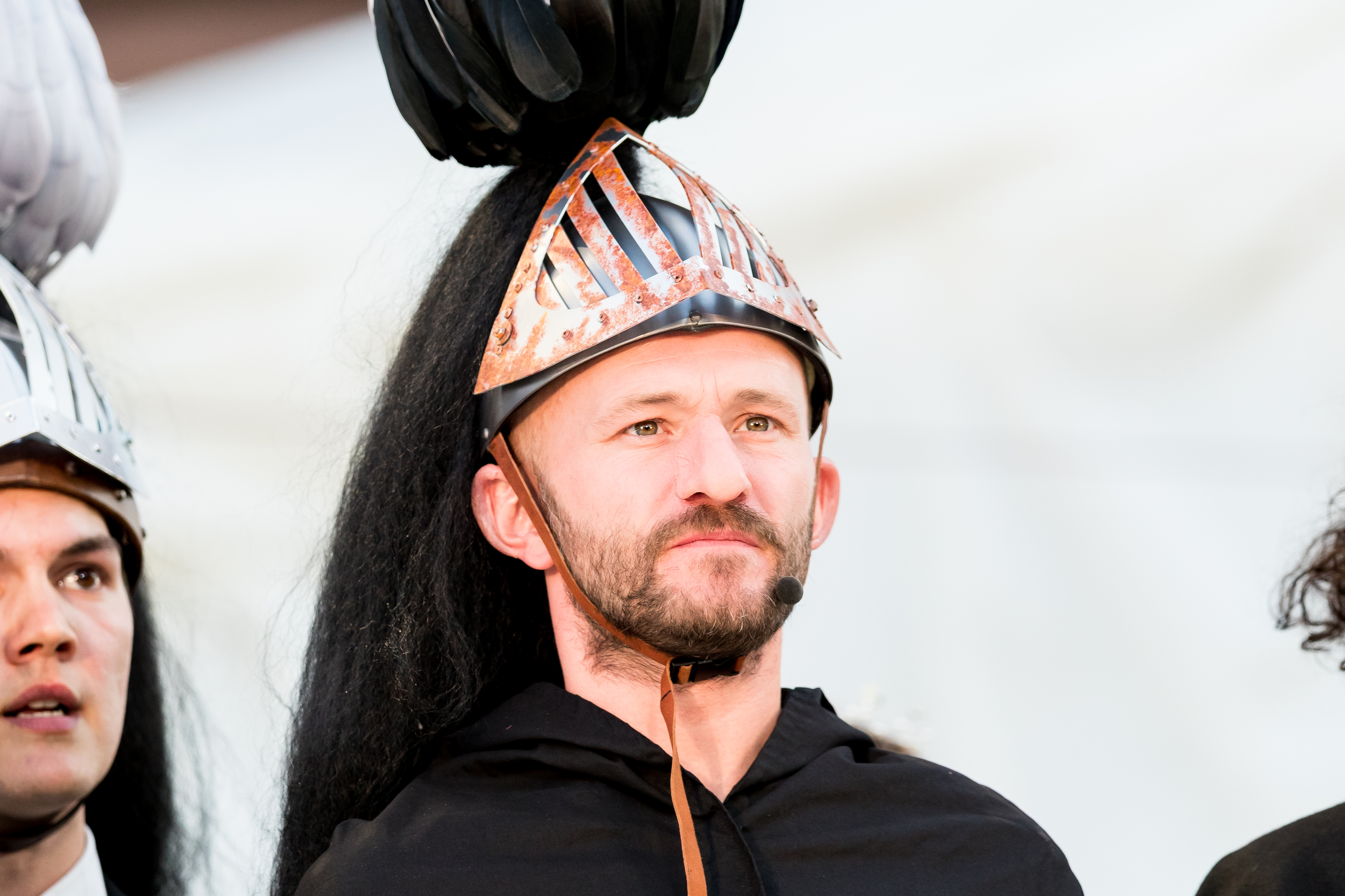 Moritz Grove during Nibelungenfestspiele ( at Worms, Rheinland-Pfalz, Germany on 2019-07-10, Photo: Sven Mandel